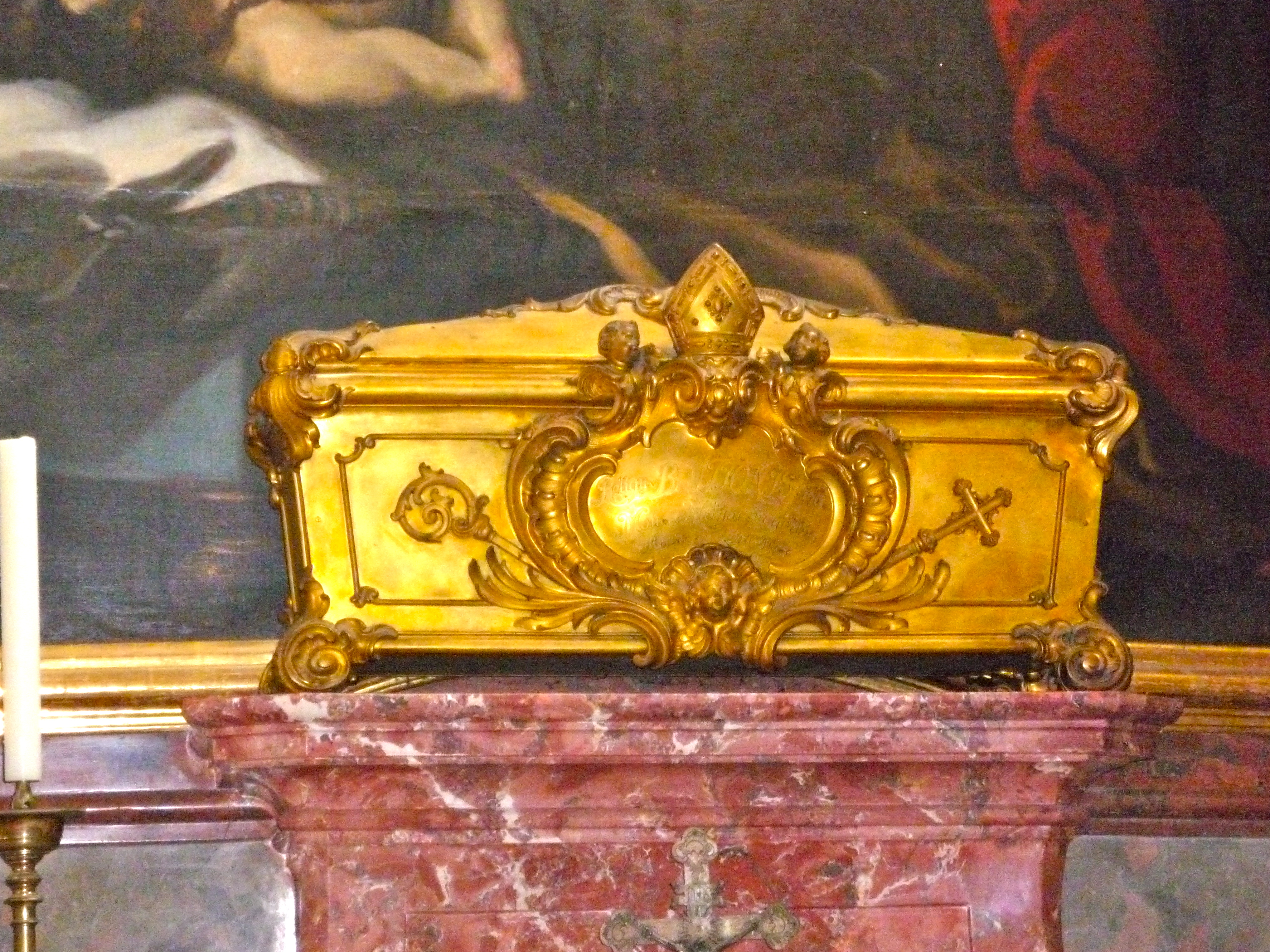 Klosterkirche Metten: Reliquiar mit den Überresten des Seligen Utto, des ersten Abtes des Klosters, am rechten Seitenaltar